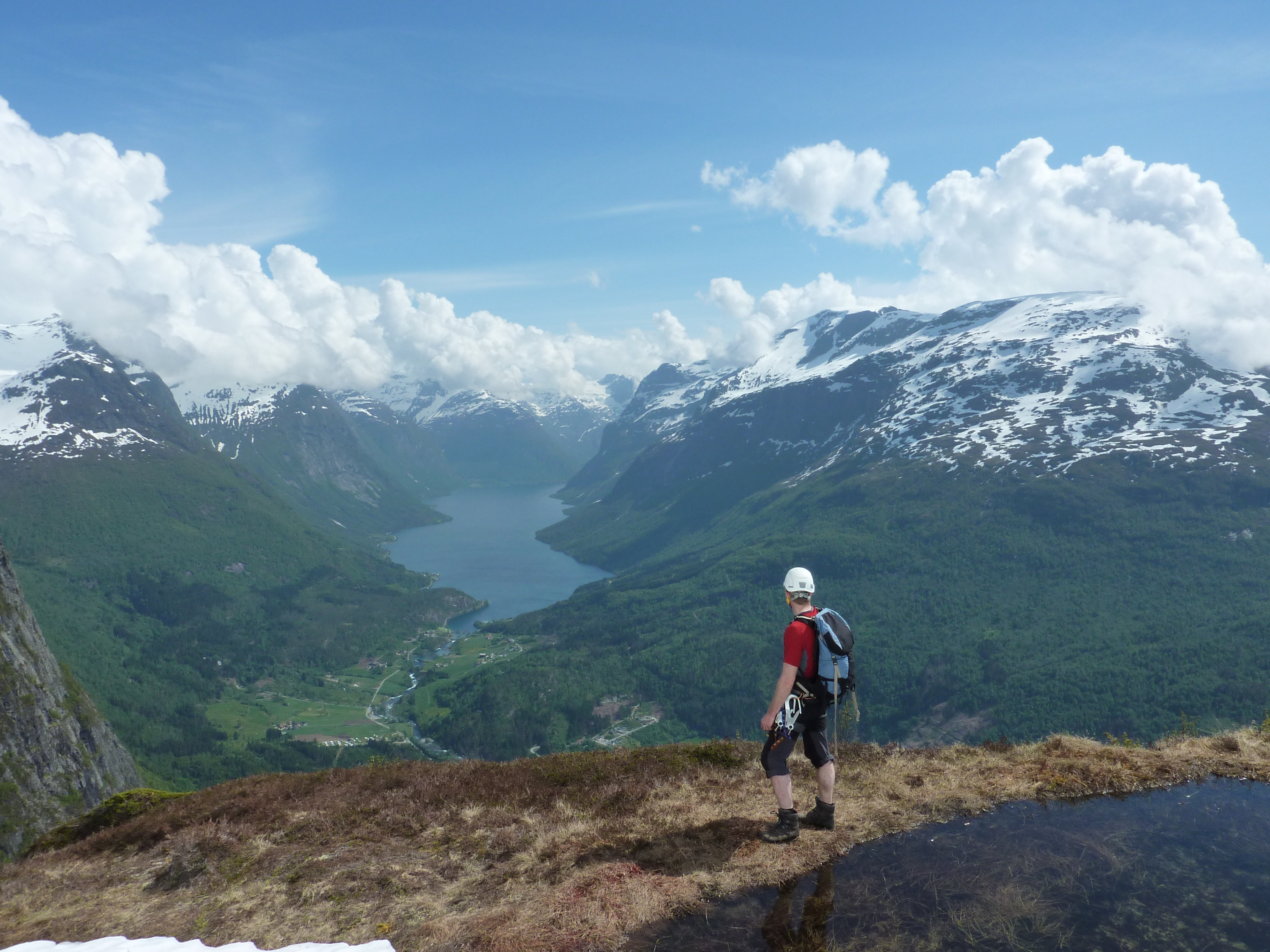 Via Ferrata Loen, etter utsteget.